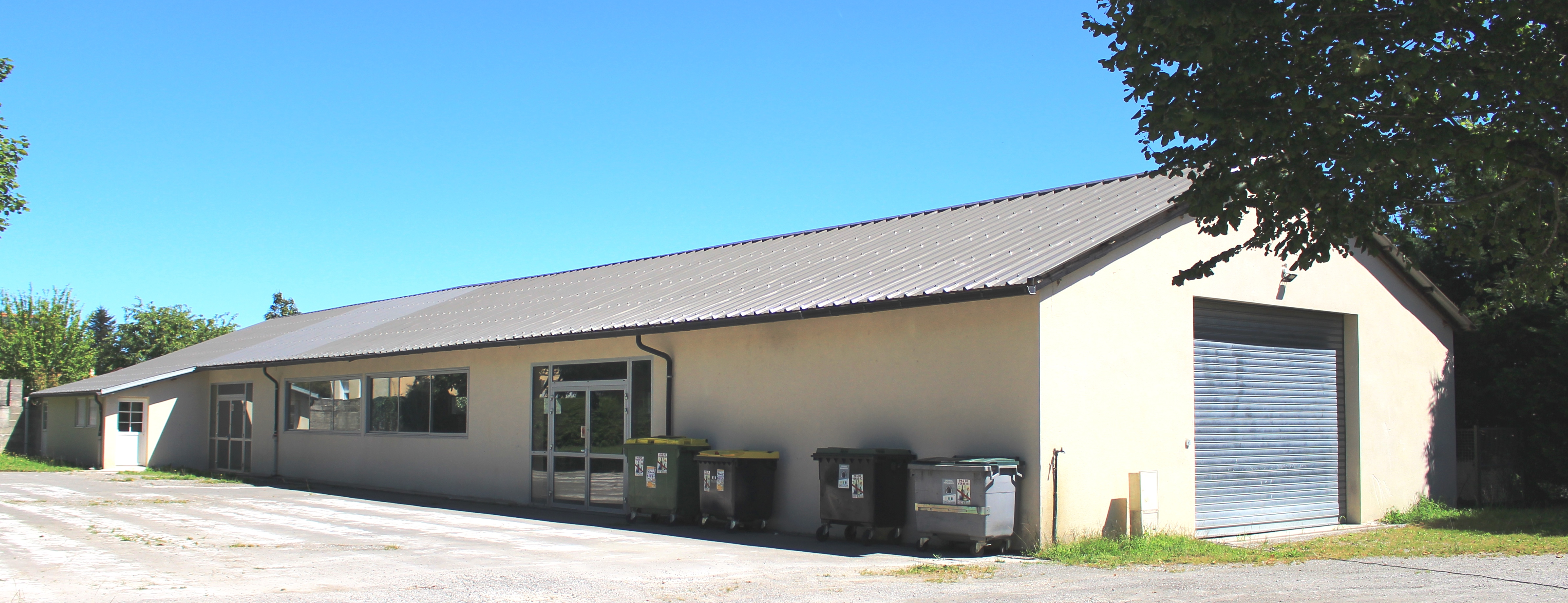 Salle des fêtes de Hèches (Hautes-Pyrénées)